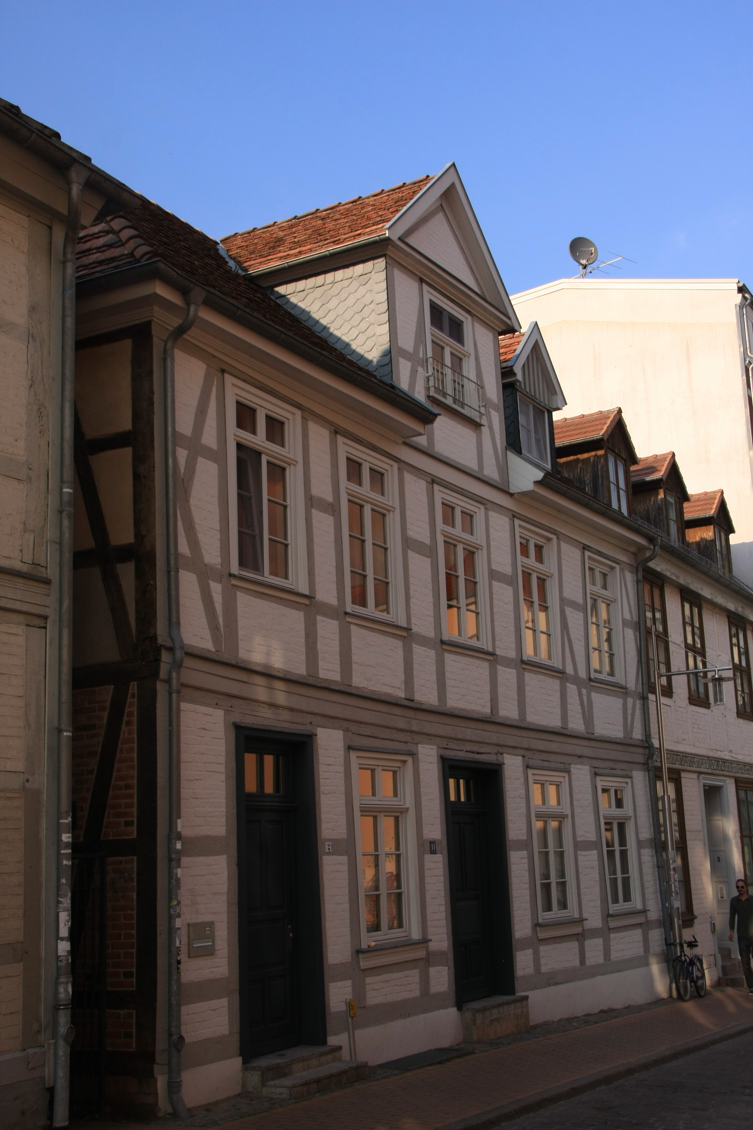 19055 Schwerin, Münzstraße 11